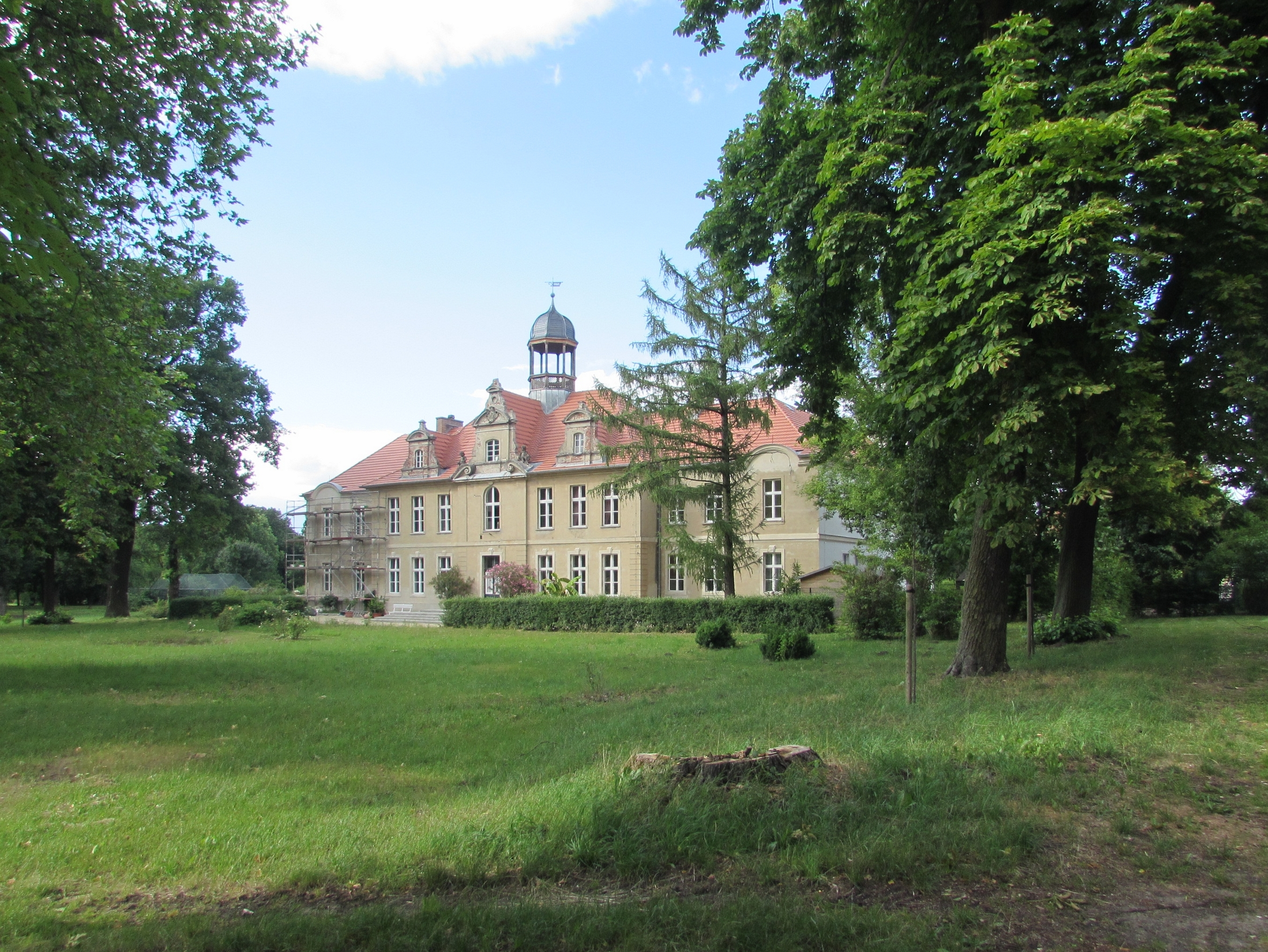 gutshaus karow, jerichower land, südseite zum park